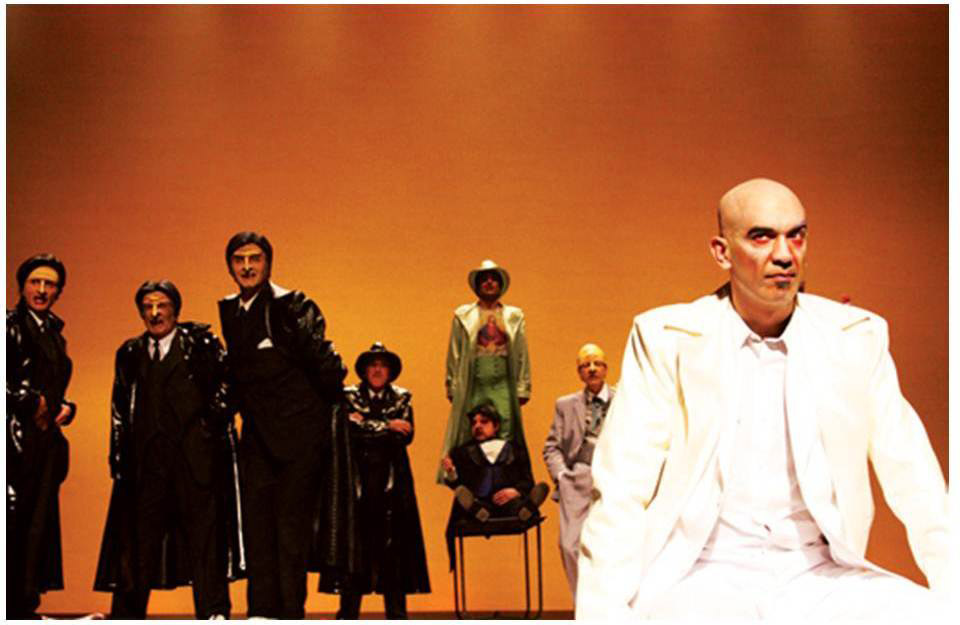 ARTURO-UI